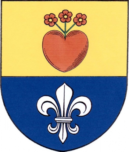 znak, Petráveč, okres Žďár nad Sázavou